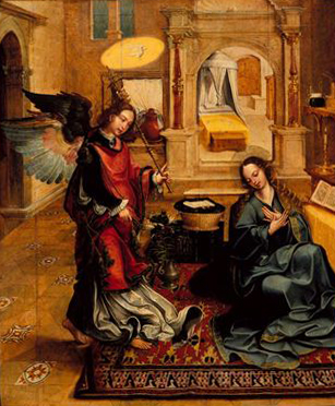 De acordo com uma nota escrita pelo Dr. José de Figueiredo no Livro 1º da Entrada de Correspondência, os seis quadros que formam o retábulo dito de Santos-o-Novo, estavam no coro de baixo da igreja do respectivo mosteiro no ano de 1911, data da entrada do conjunto no Museu das Janelas Verdes. Passa-se a transcrever parcialmente o documento citado (fl.6): "Em 22 do corrente (Agosto de 1911) esteve o Director do Museu no Recolhimento de Santos-o-Novo a receber vários objectos ali existentes, em virtude do despacho do Ex.mo Ministro da Justiça. Esses objectos, entregues ao Director na presença de dois vogais da Comissão Jurisdicional das Extintas Congregações, são: 6 quadros de madeira do século XVI escola de Lisboa, representando respectivamente a «Anunciação», «Natividade», «Adoração dos Reis Magos», «Cristo no Horto», «Enterro de Cristo» e «Ressurreição de Cristo» e estavam no coro de baixo da referida Igreja;..." (cf. João Couto, O retábulo quinhentista de Santos-o-Novo, p.13, nota 1).